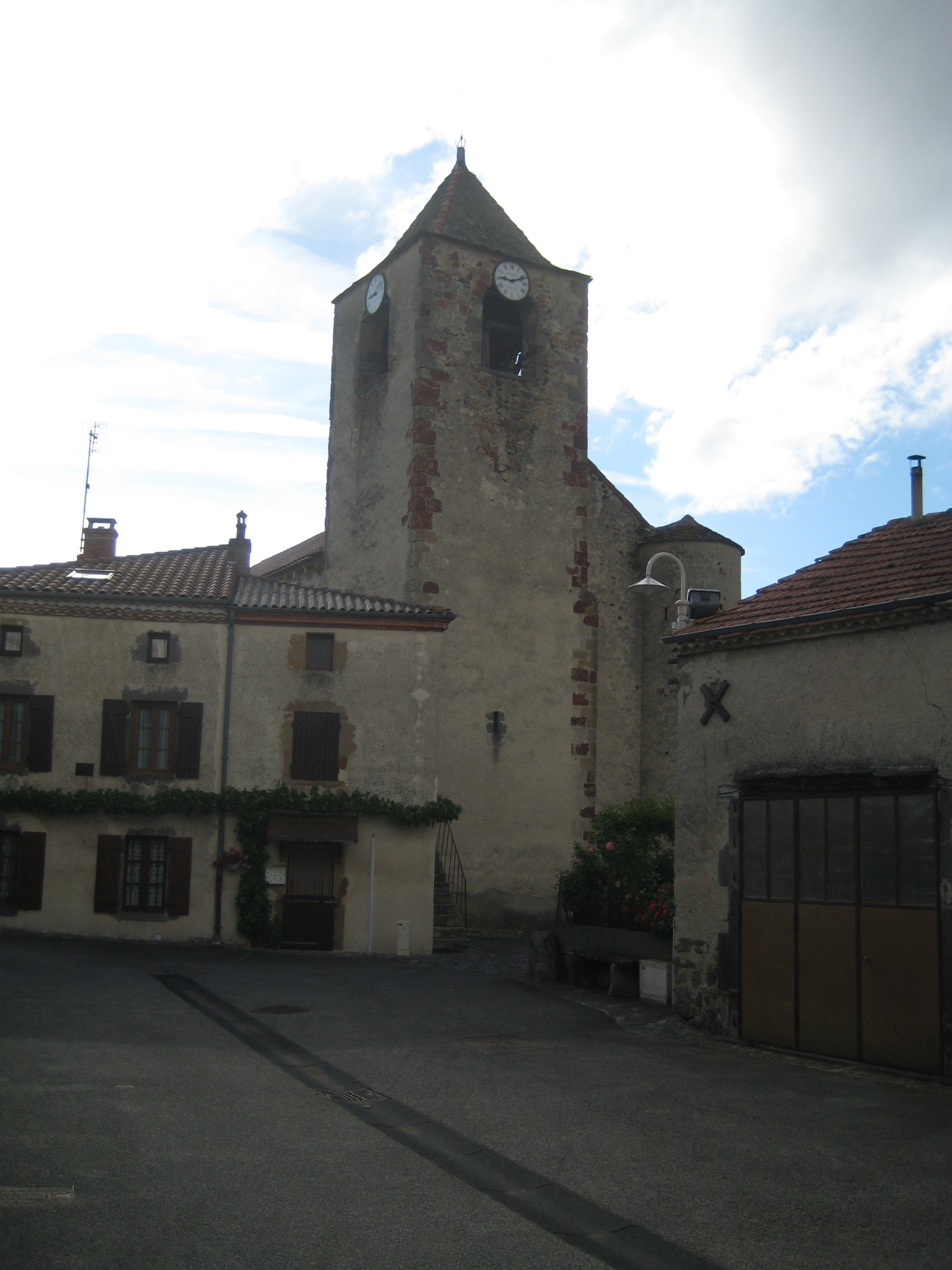 Église d'Apchat